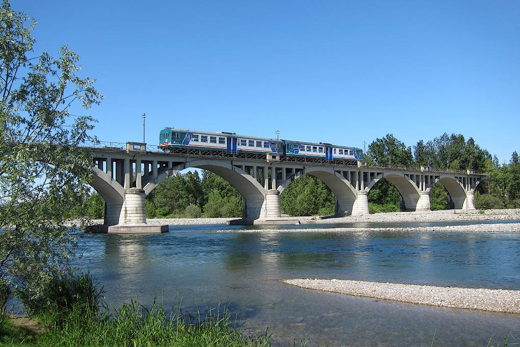 Il ponte sul Sesia della ferrovia Biella-Novara presso Ghislarengo. È in transito una coppia di automotrici termiche ALn 663 delle Ferrovie dello Stato.